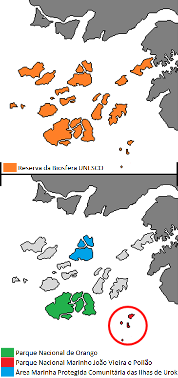 Identificação das áreas protegidas dentro do Arquipélago dos Bijagós